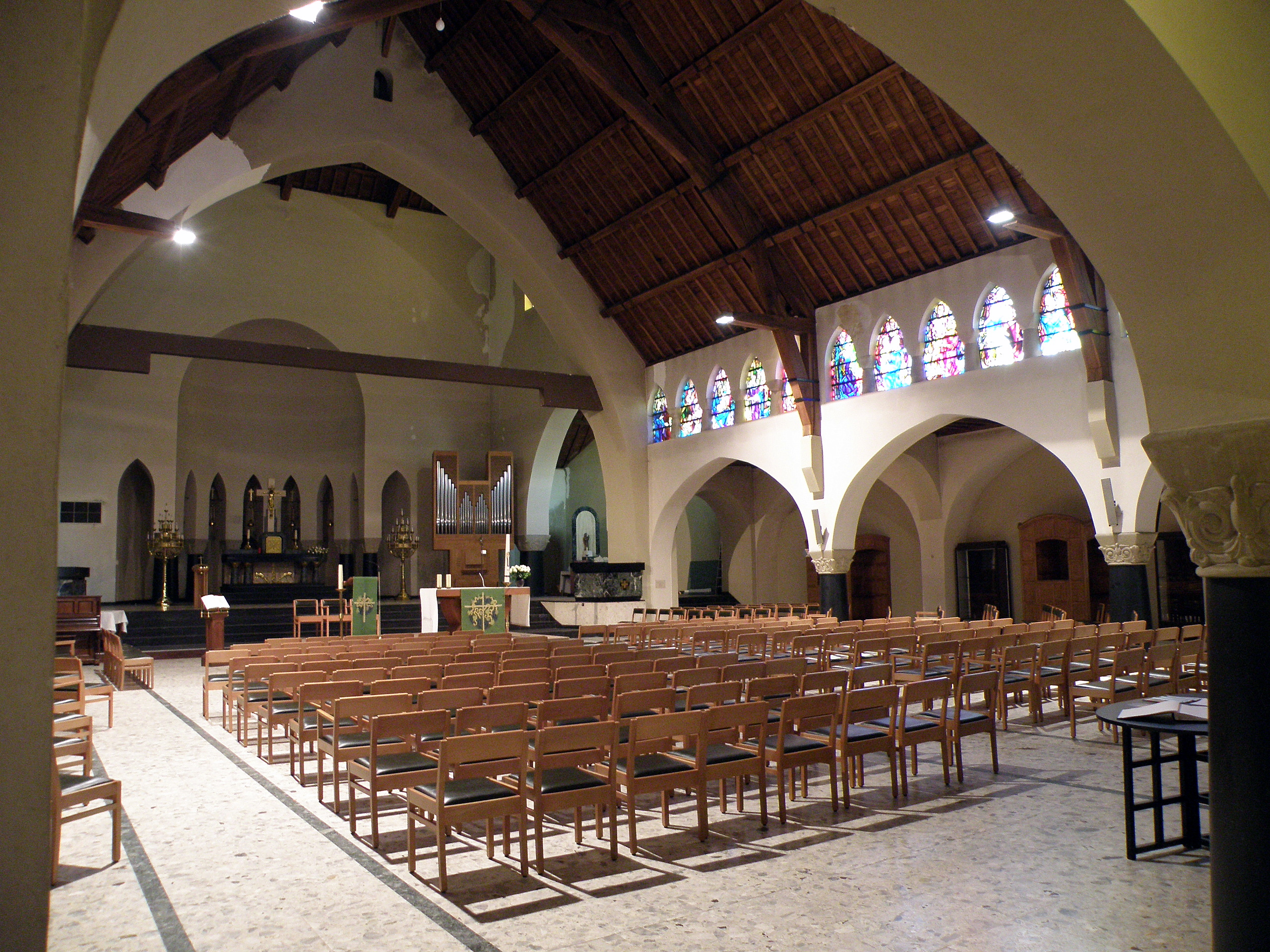 Anvers, Belgique. Église paroissiale Saint-Joseph (en néerl. Sint-Jozefkerk), sise Boekenberglei n° 211 à Deurne, faubourg (district) de la proche banlieue est d’Anvers. Vue intérieure. Œuvre de Jef Huygh et Flor Van Reeth, 1933-1936.